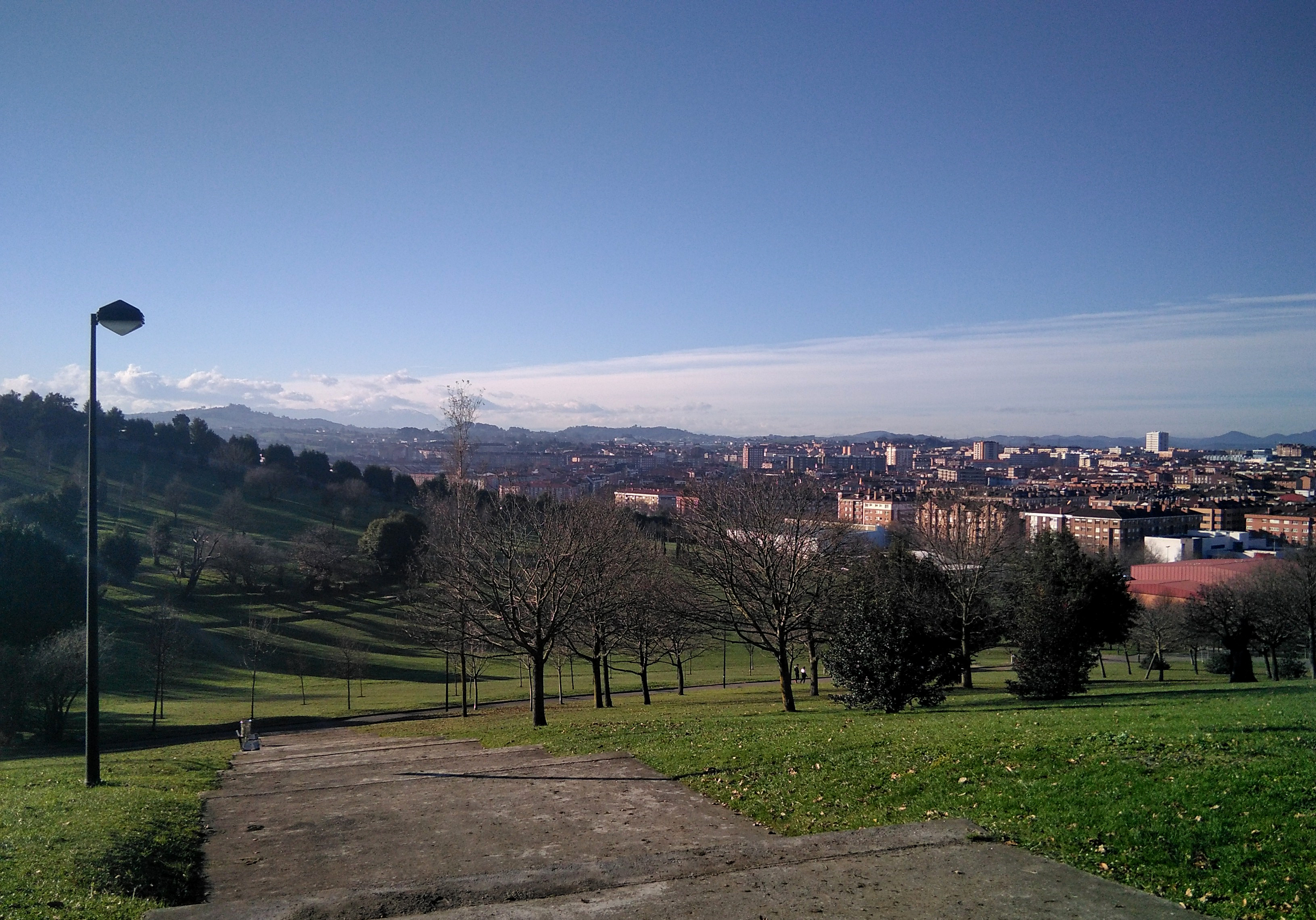 Tramo de escaleras en el parque de los Pericones, en Gijón (Asturias, España). Fotografía de diciembre de 2017.